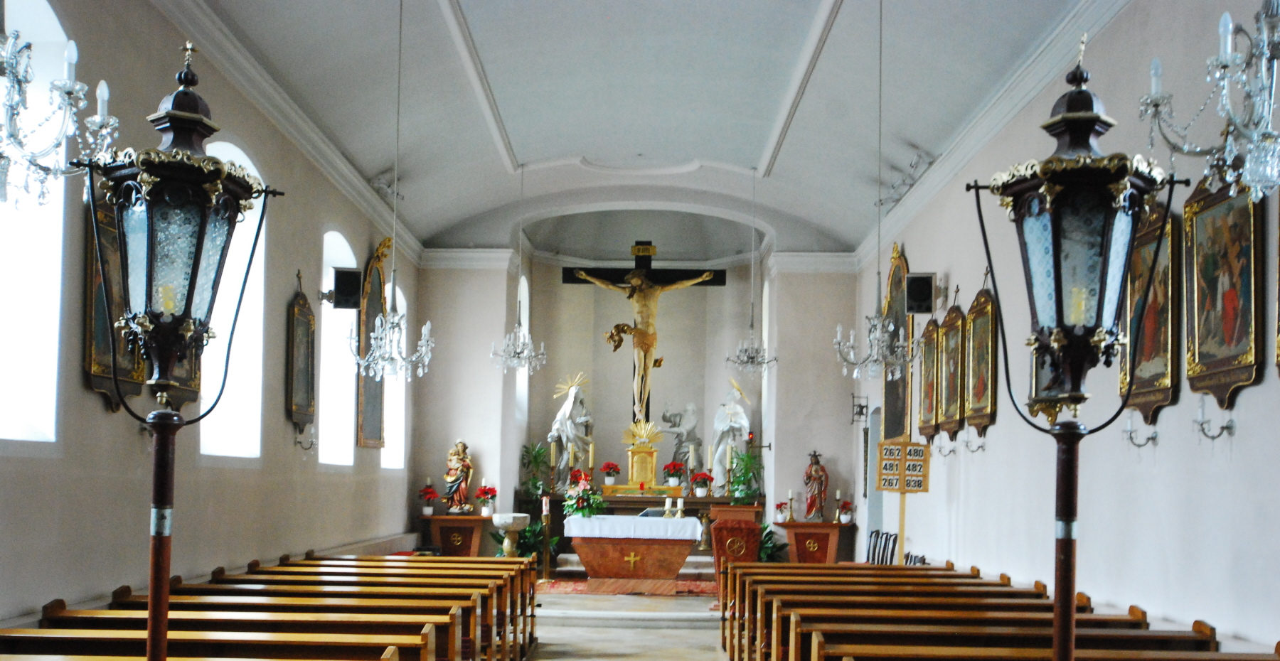 Innenraum der Pfarrkirche von Laab im Walde in Niederösterreich